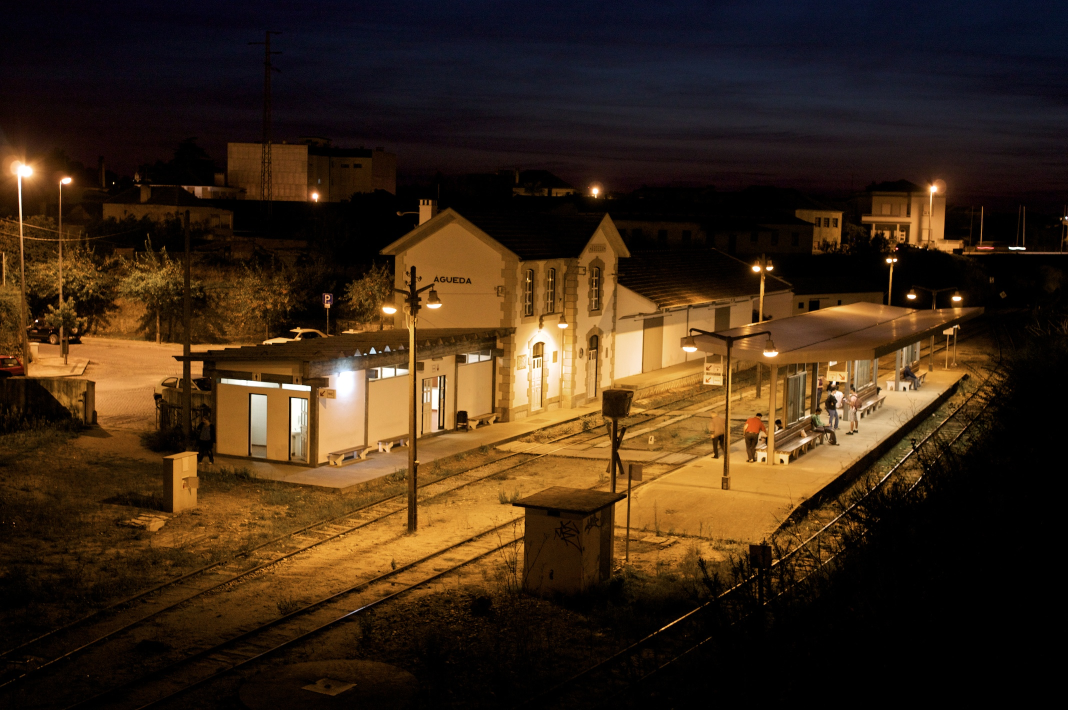 Tipo: E Estação Local: Águeda Linha do Vouga, PK 14 Data e hora: 28 de Outubro de 2009 18h24